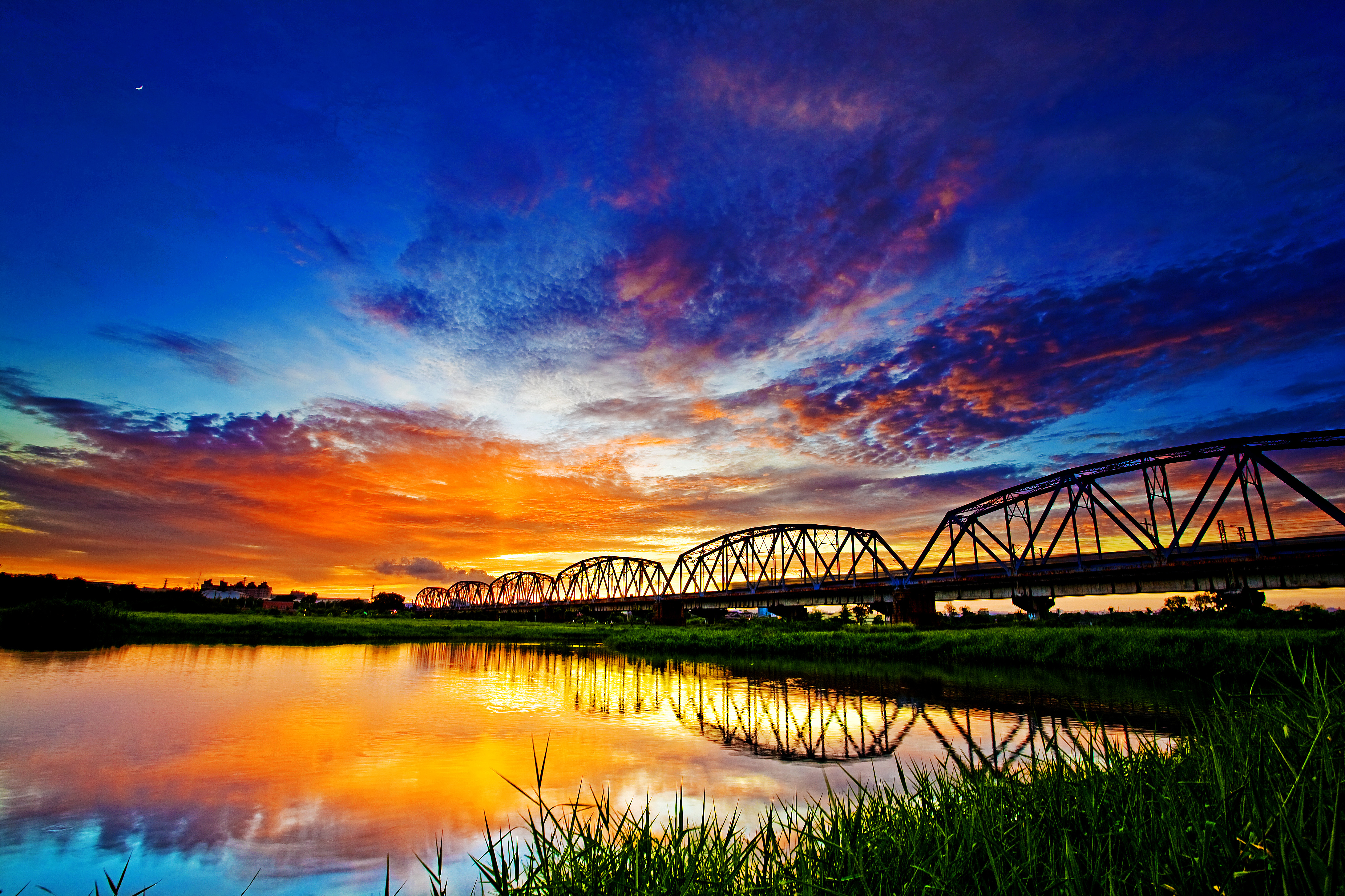 下淡水溪鐵橋其主要結構以鋼桁架橋為主，由二十三座磚石混砌的橋墩分隔二十四到橋孔，橋孔以鋼桁架單元組構而成。鋼桁架高度15.1公尺，跨距64.3公尺，採簡支對稱式山型鋼構架型式。